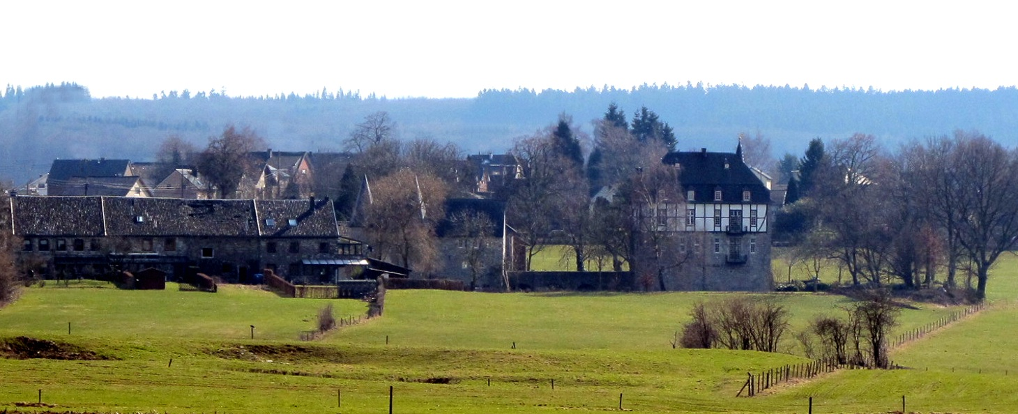 Schloss und Gutsgebäude Libermé in Eupen-Kettenis